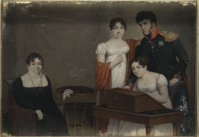 Княгиня Анастасия Симоновна Долгорукова с детьми: Елена Петровна Толстая, Мария Петровна Римская-Корсакова и князь Михаил Петрович Долгоруков.